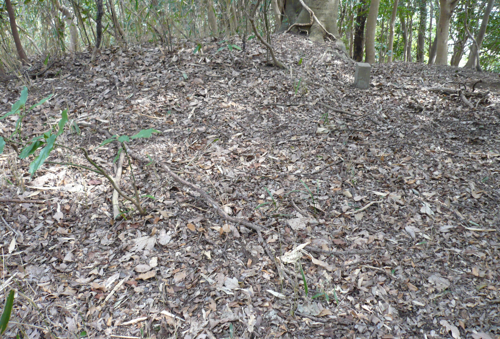 東曲輪最高所